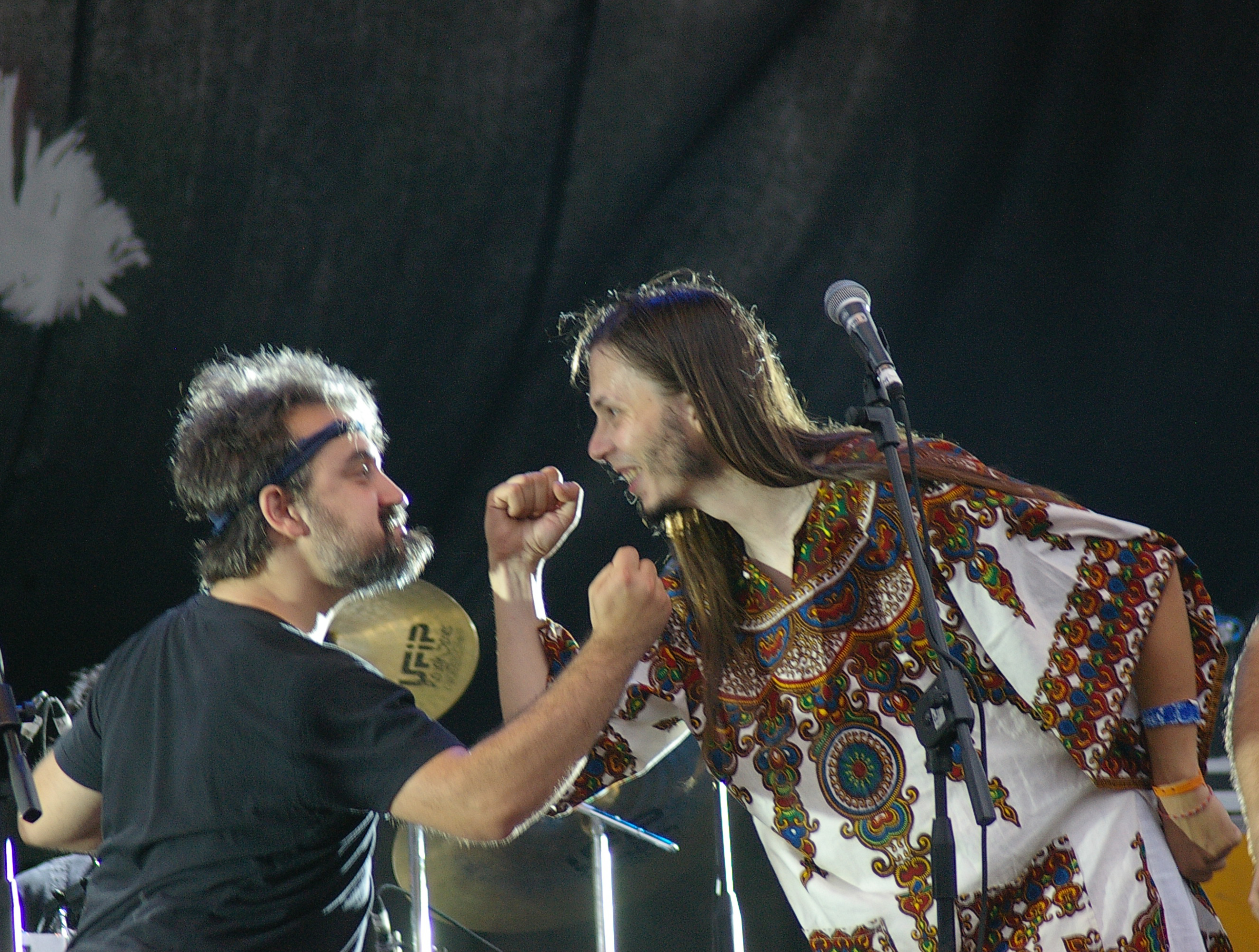 Alessandro Fiori ed Enrico Gabrielli dei Mariposa il 19-06-09, a Milano, durante il concerto IL PAESE è REALE